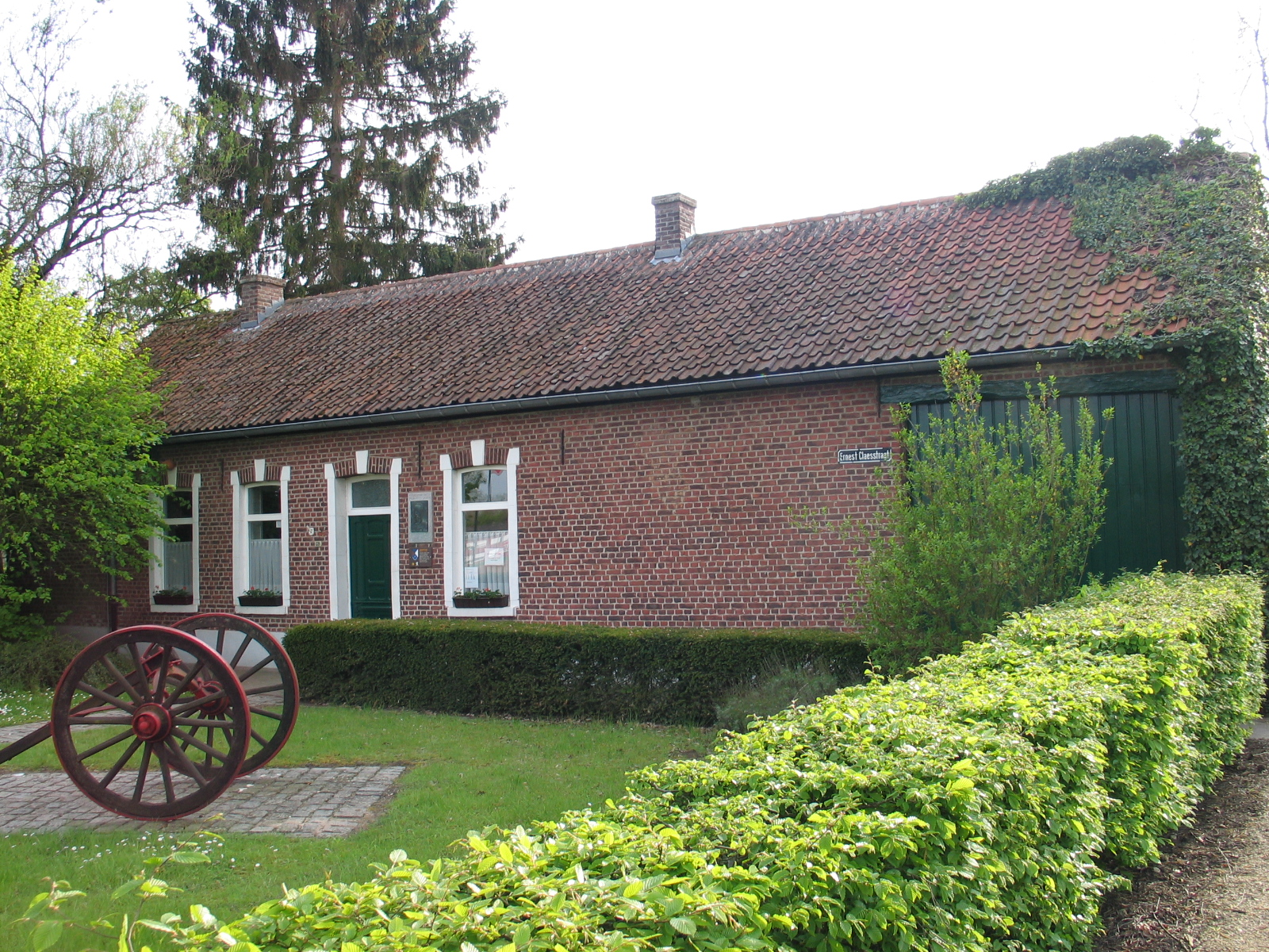 geboortehuis Ernest Claes te Zichem - eigen foto